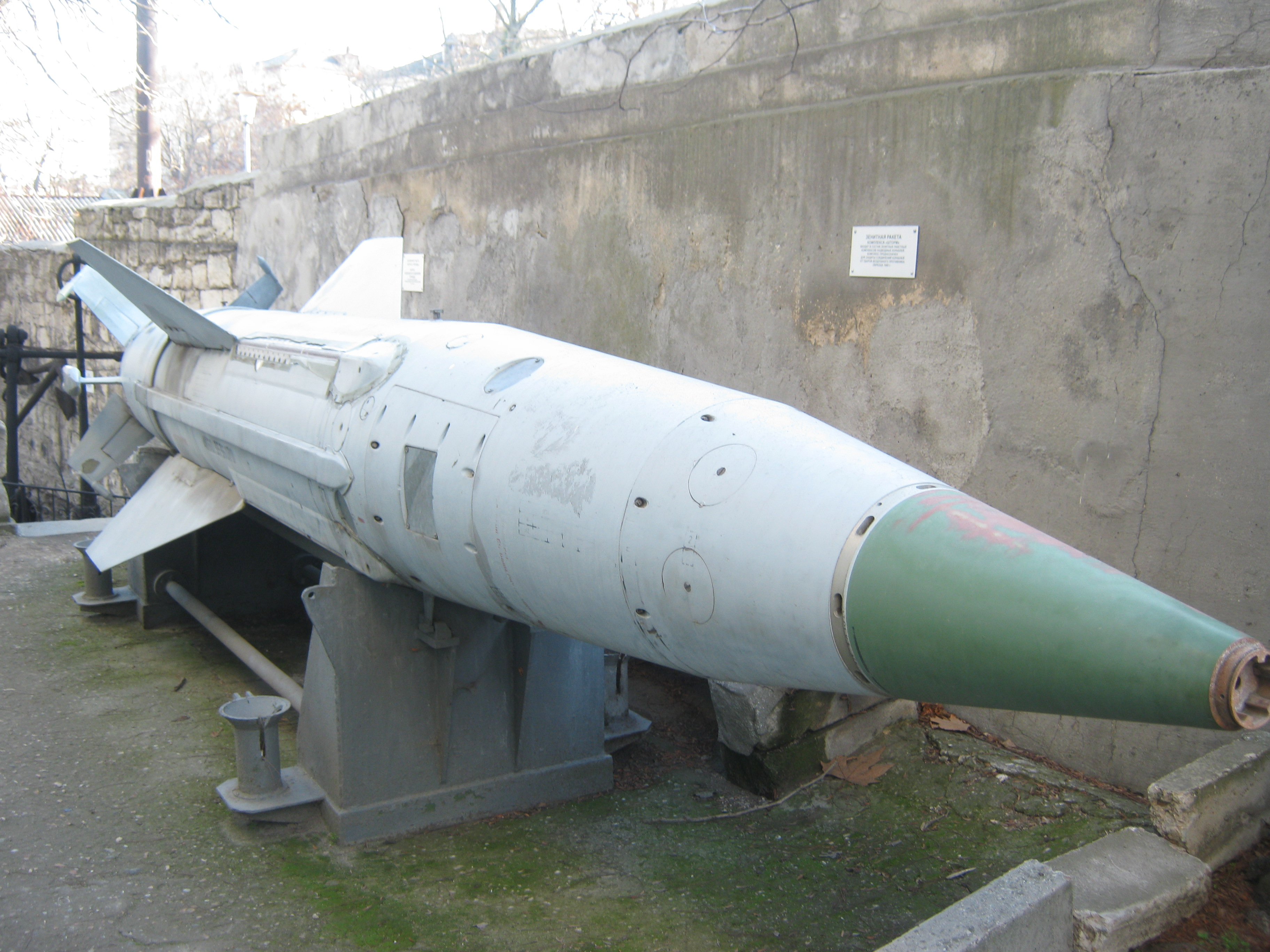 Ракета М-11 "Шторм" из экспозиции музея Черноморского флота в Севастополе